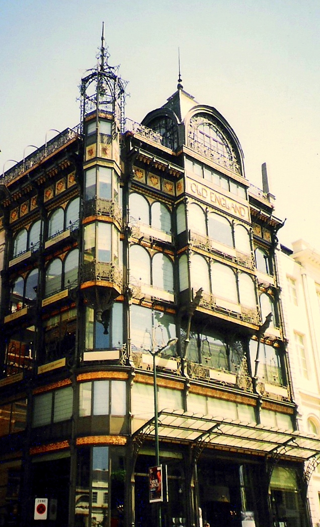 BRUXELLES - Old England. Casa - museu modernista.